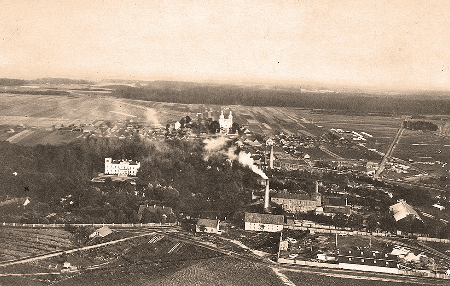 Беларуская (тарашкевіца): Лынтупы (Łyntupy). Аэрафотаздымак